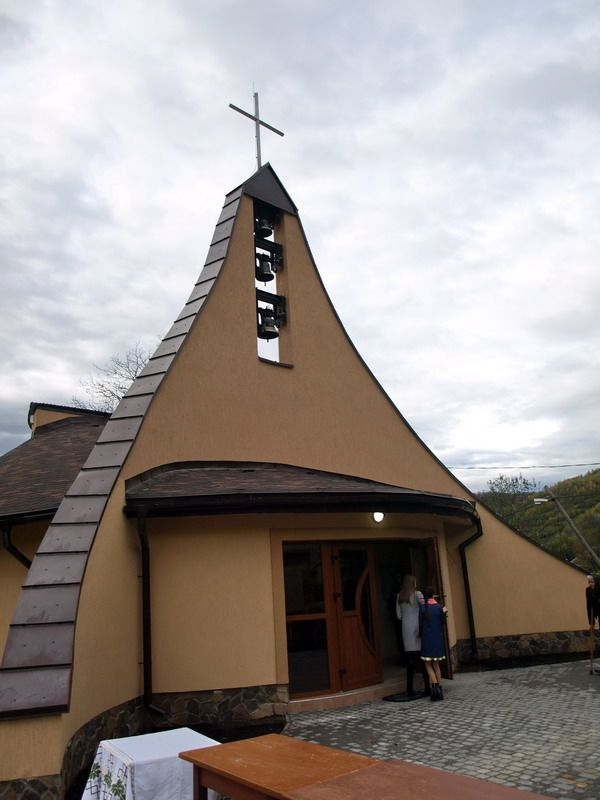 костел